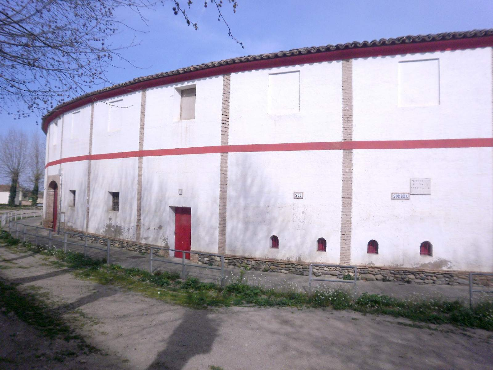 Plaza de Toros nueva de Tarazona